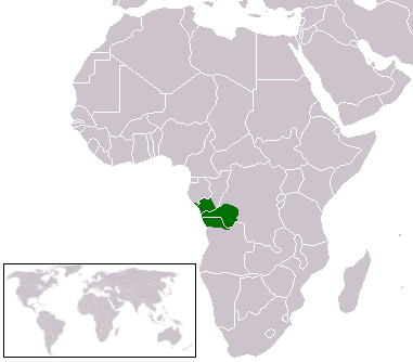 Kikongo language Dark green: native speakers of Kikongo and Kikongo ya Leta (Kituba)